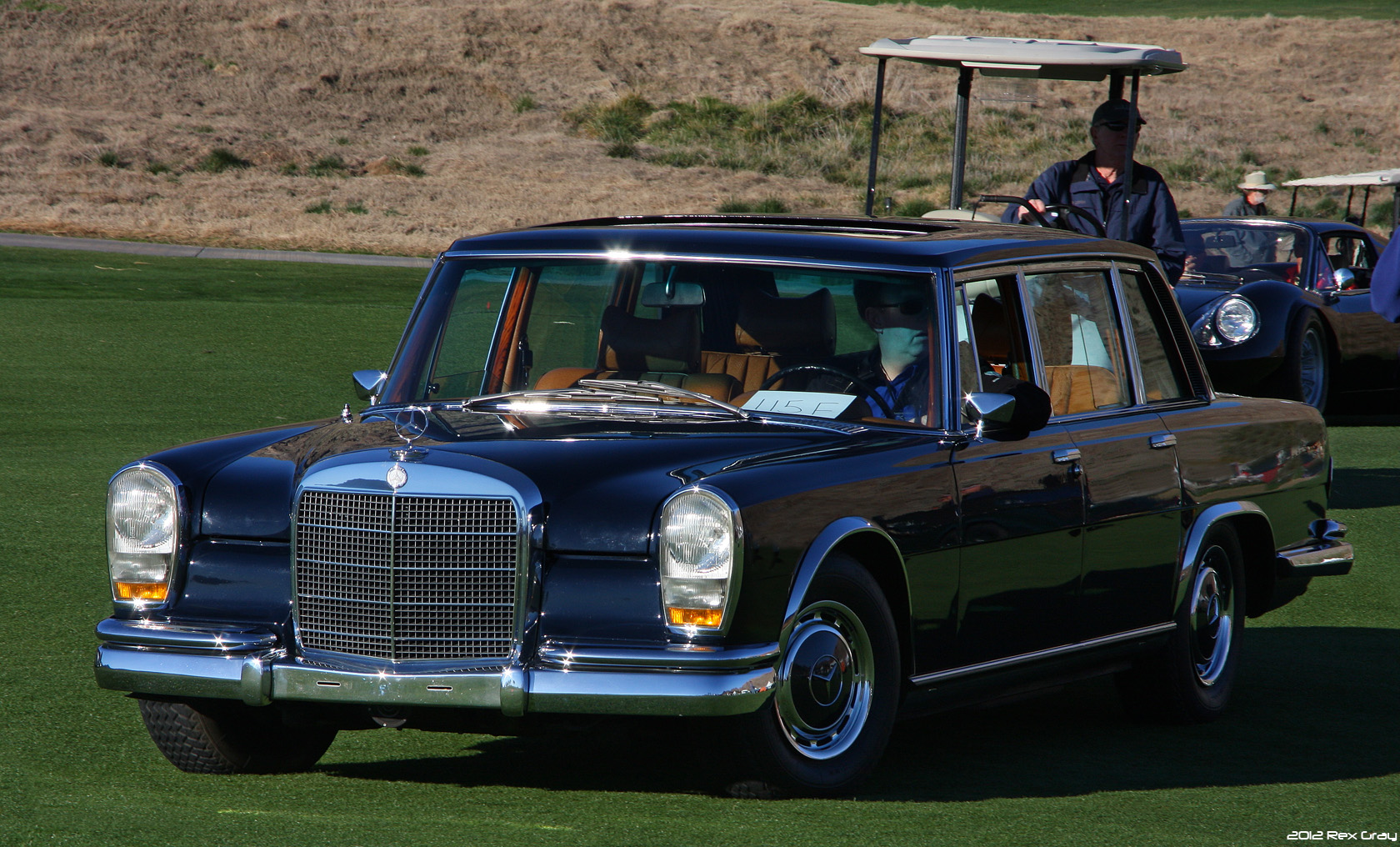 1969 Mercedes-Benz 600 - fvl